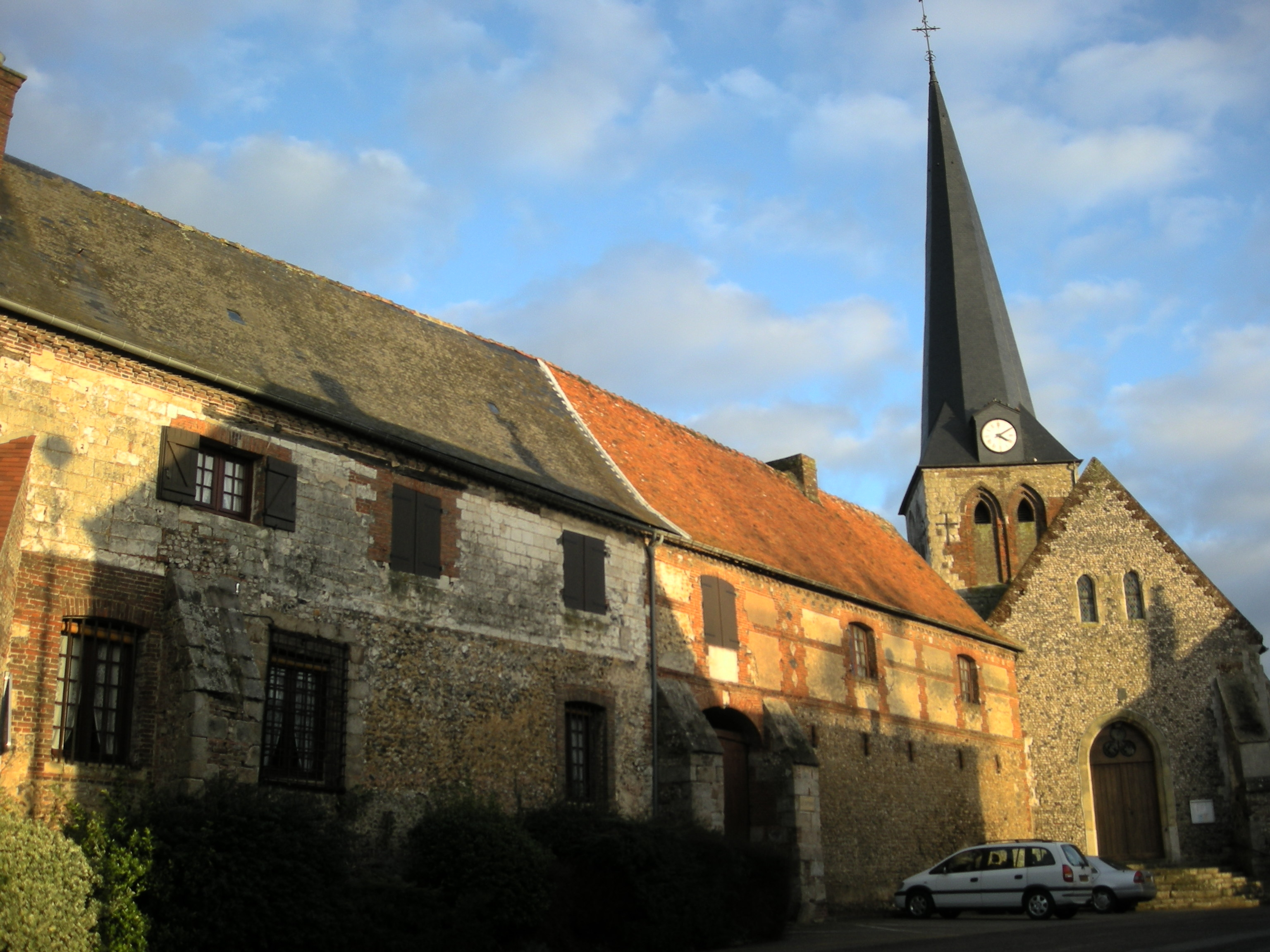 Doyenne et église Saint Vaast